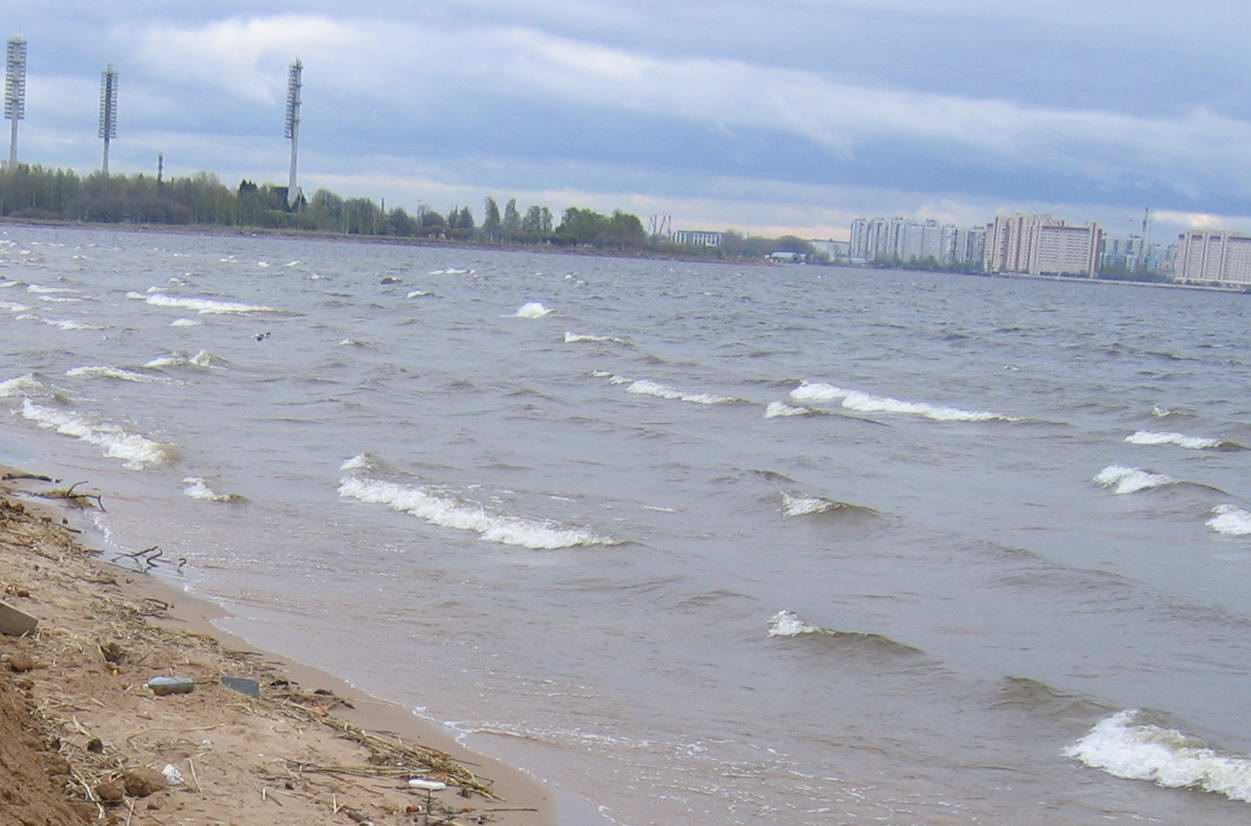 Neva Gulf. Vasilevski island (Sankt-Petersburg. Russia)